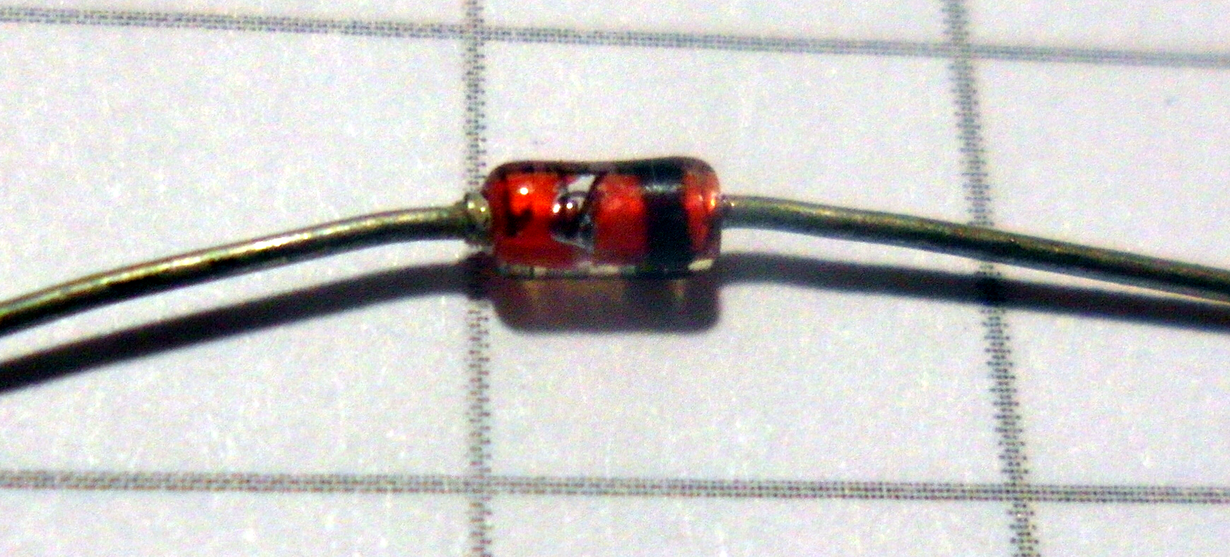 Импортный стабилитрон 0.5 Вт на 4.3 Вольта. Шаг сетки - 1 см.